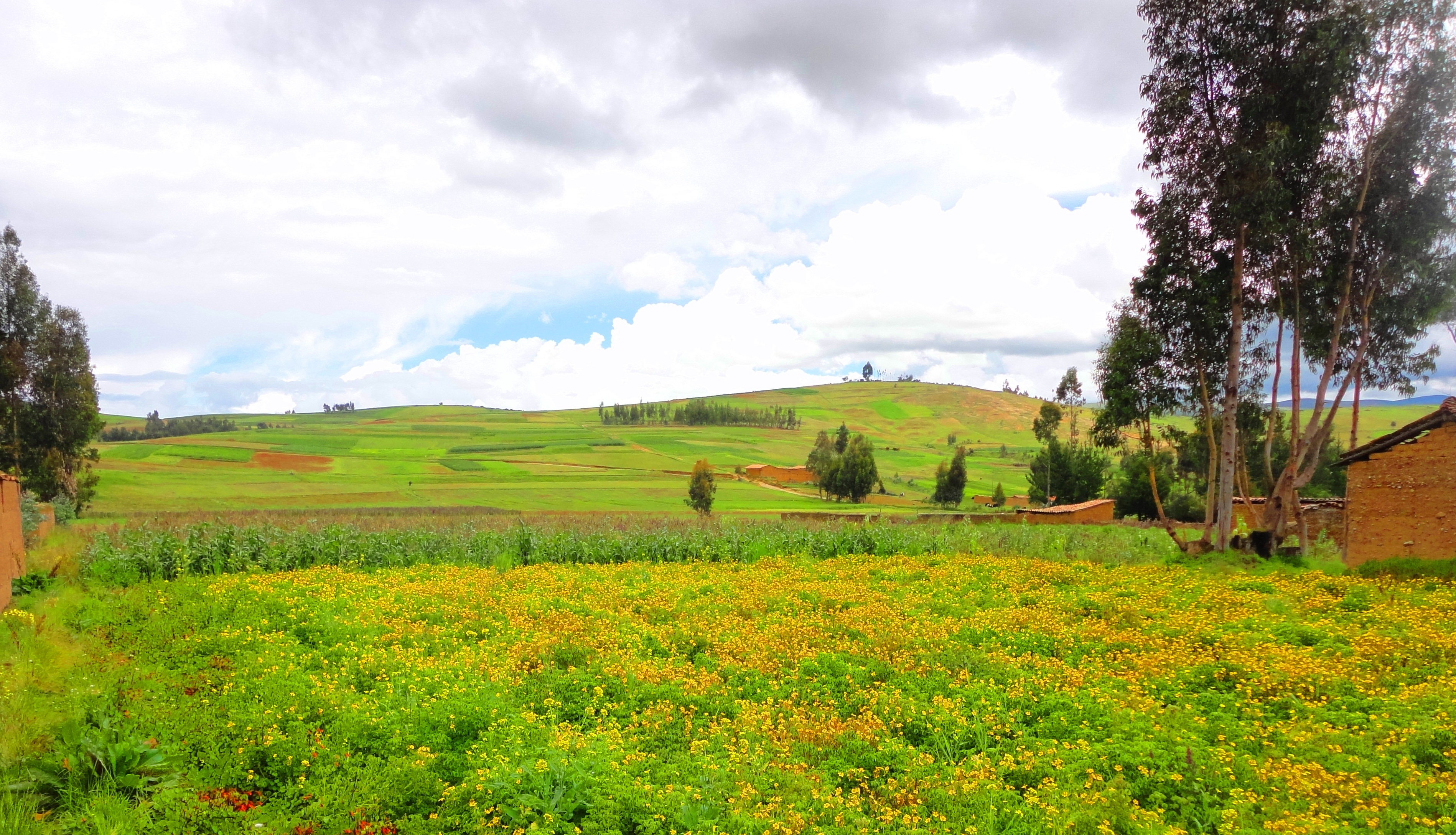 campo de flores masminas